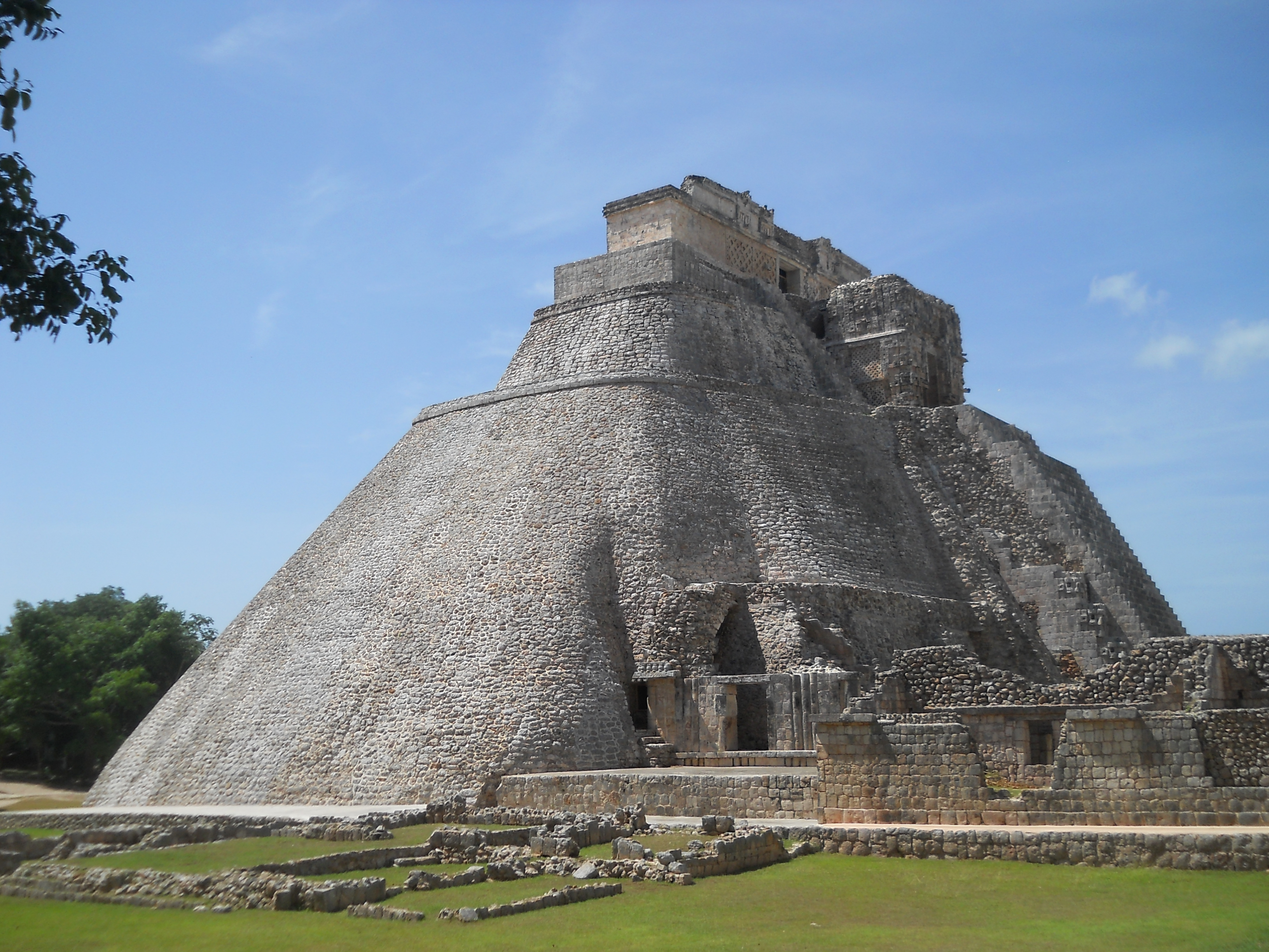 Piramide di Adivino, presso il complesso archeologico Maya di Uxmal nello Yucatan, Messico.